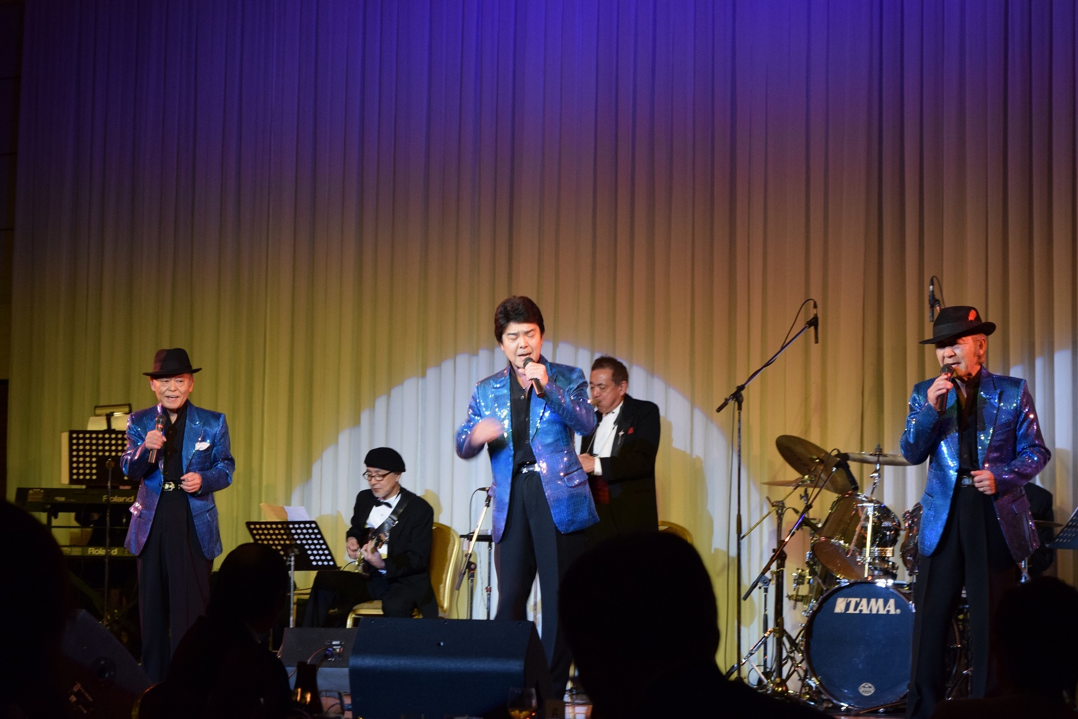 2017年11月27日 池袋メトロポリタンのディナーショー